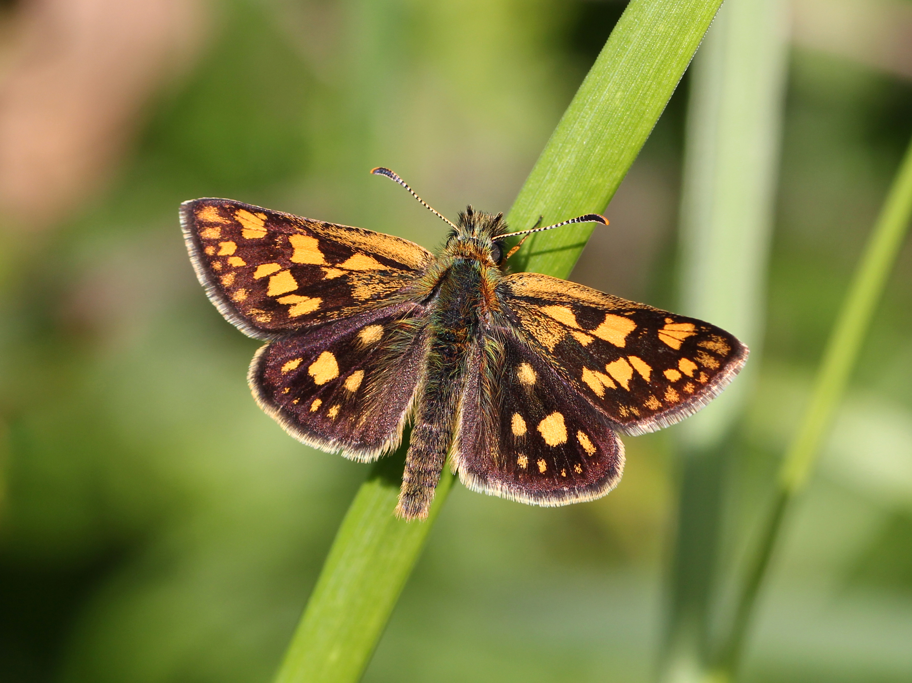 Gelbwürfeliger Dickkopffalter (Carterocephalus palaemon) am Bärenberg in Laab im Walde